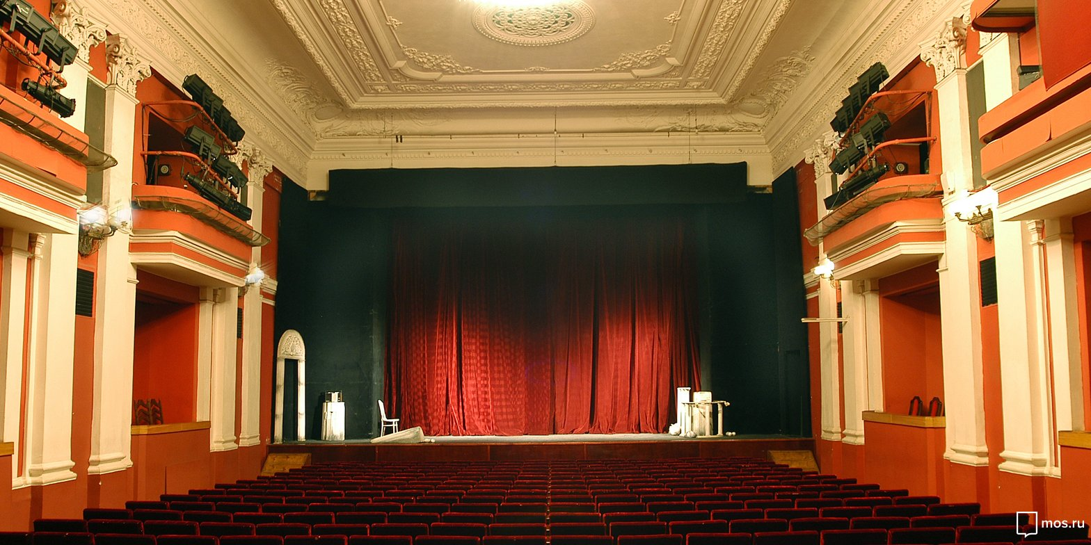 Зрительный зал Театра на Малой Бронной